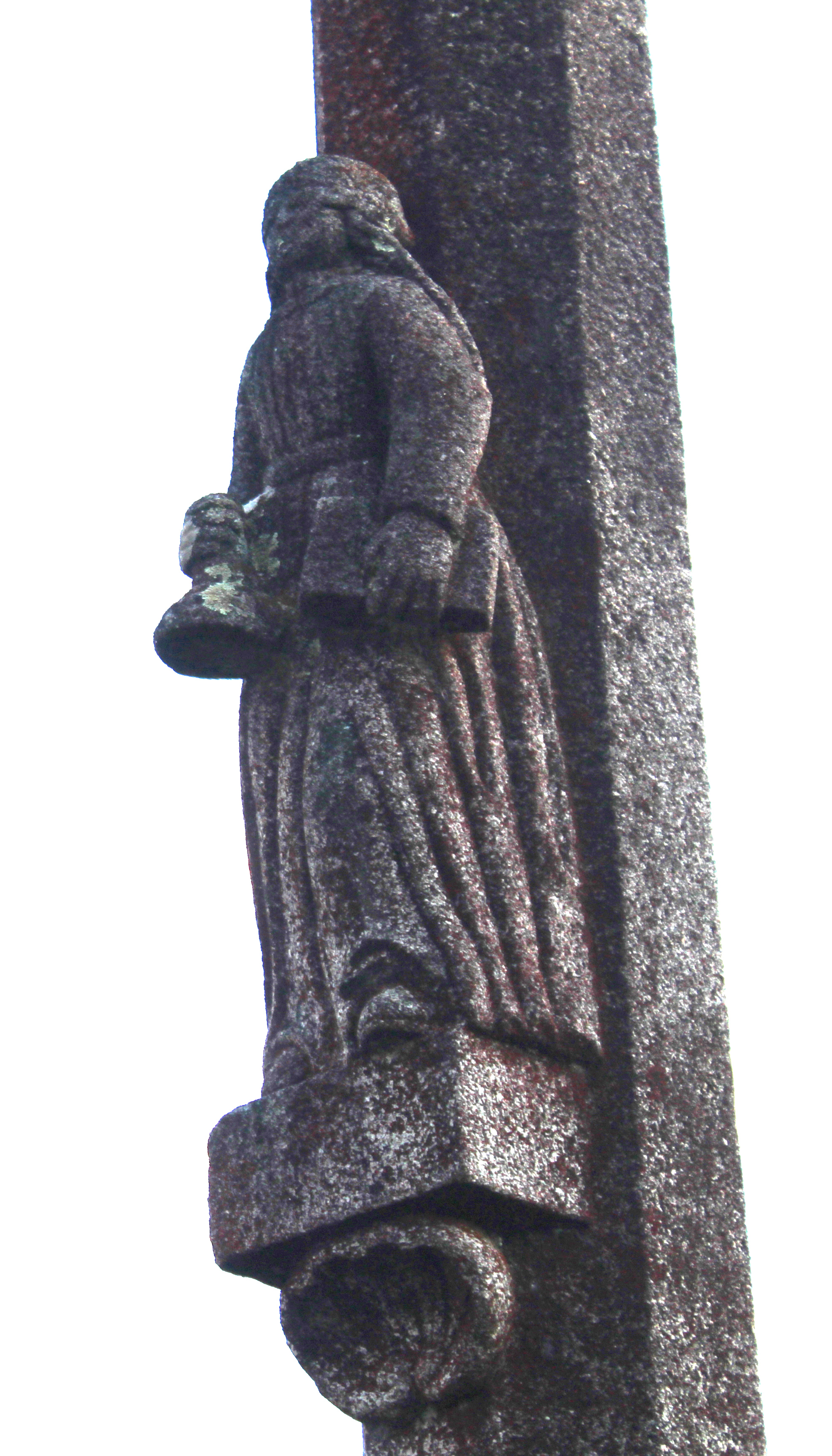 Cruceiro da Fe, detalle da escultura.